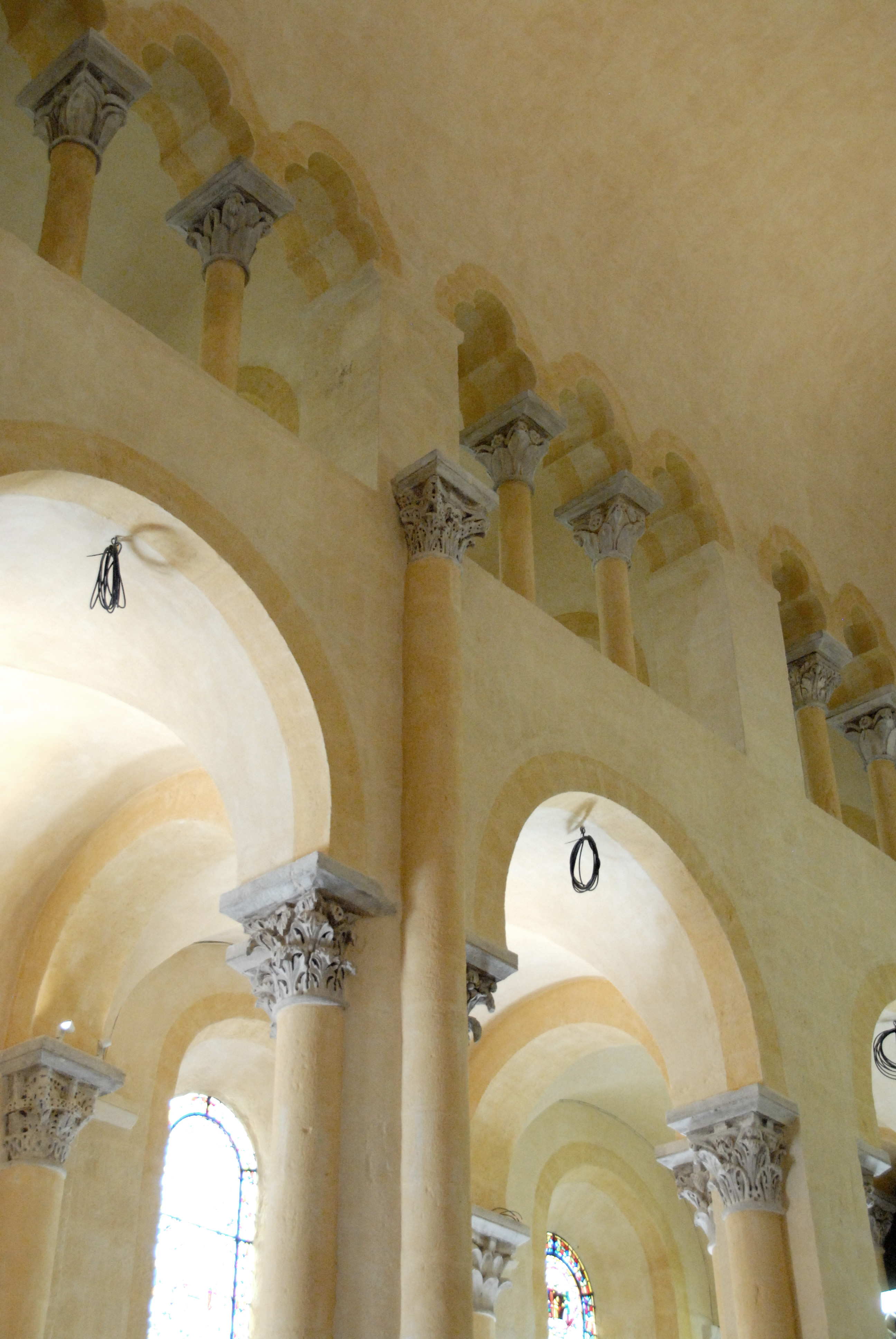 Notre-Dame du Port, Südwand Arkaden Joche 2 + 3